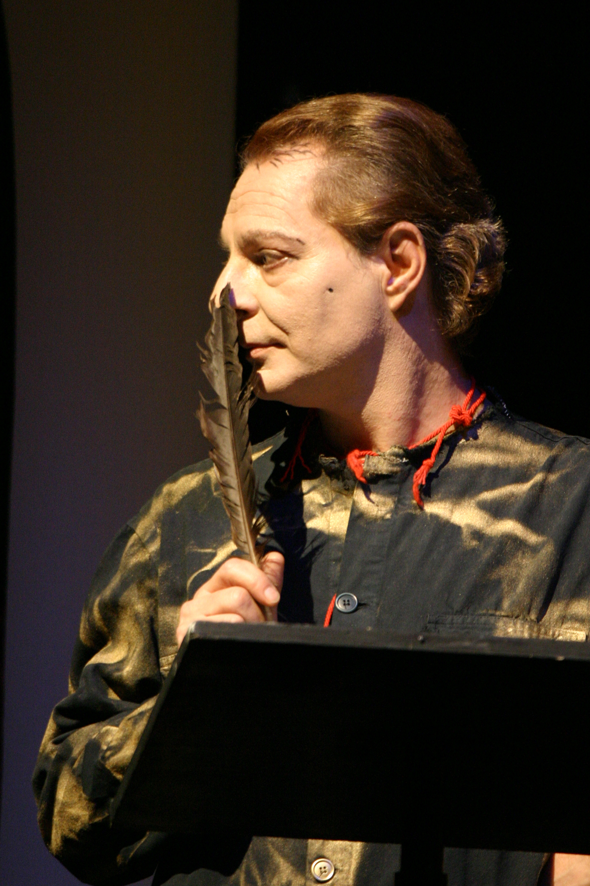 Enzo Moscato in "Ritornanti"